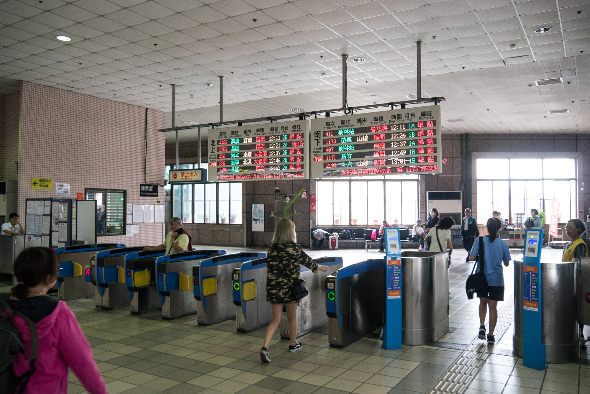 樹林車站